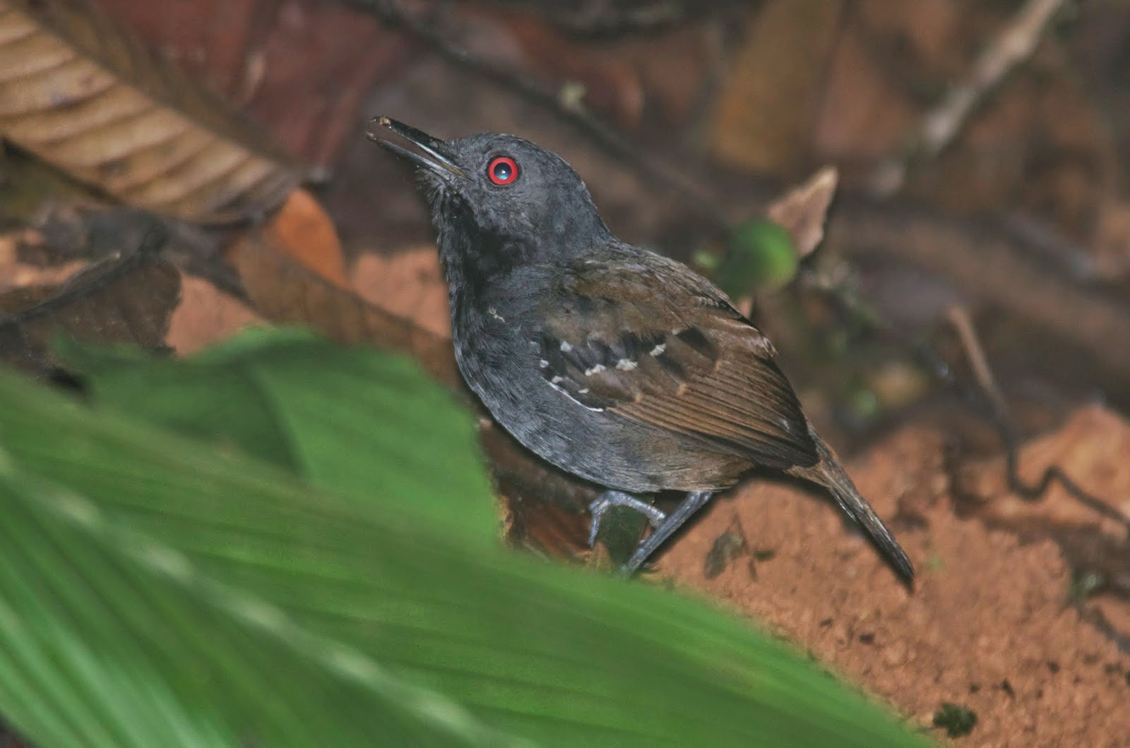 Dull-mantled Antbird Myrmeciza laemosticta, Nusagandi, Panama